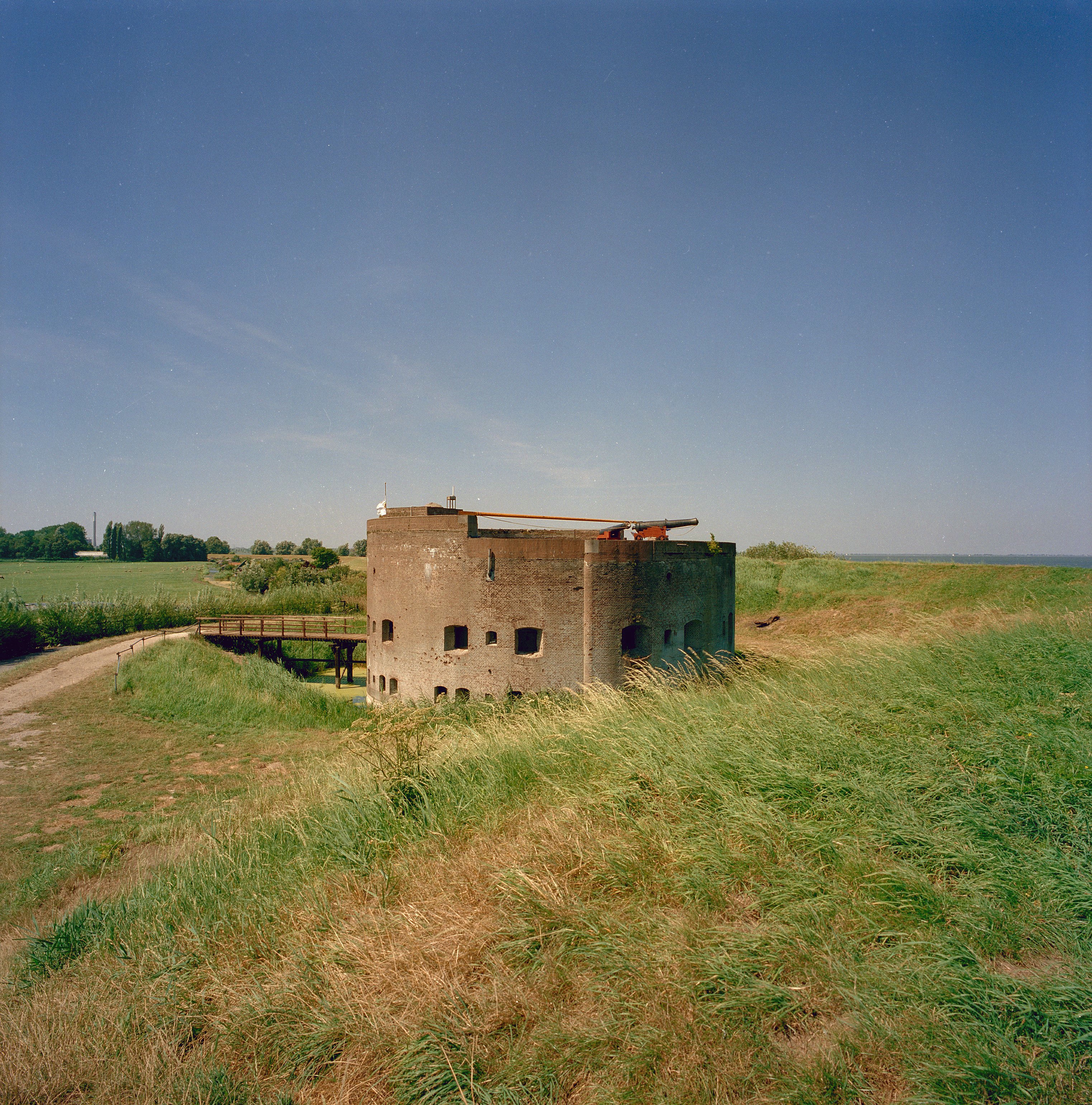 Westbatterij Muiden: Westbatterij uit 1799, in 1825 voorzien van een torenfort